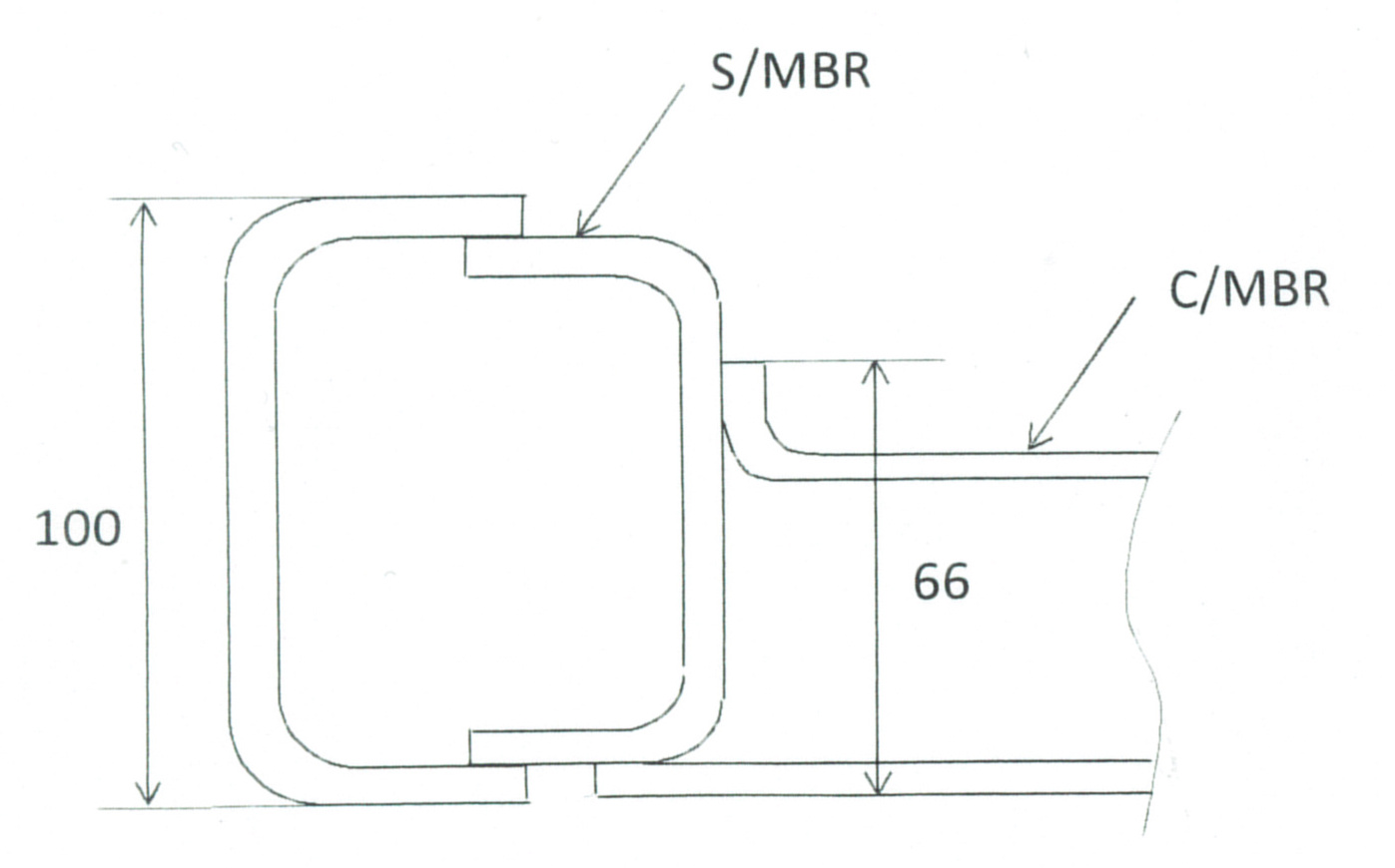 குறுக்கு வெட்டு தோற்றம்